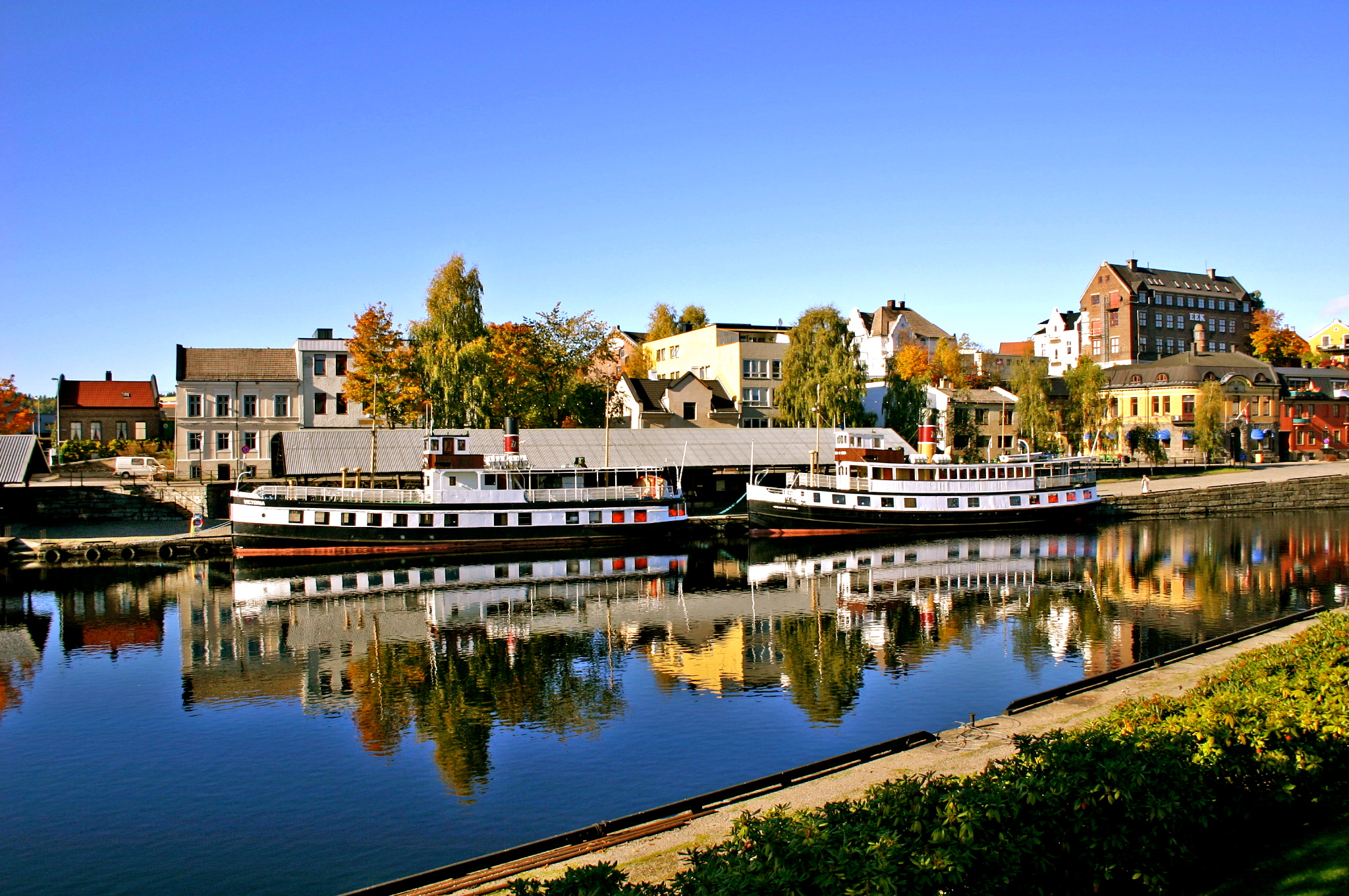 Kanalbåtene Henrik Ibsen og Victoria